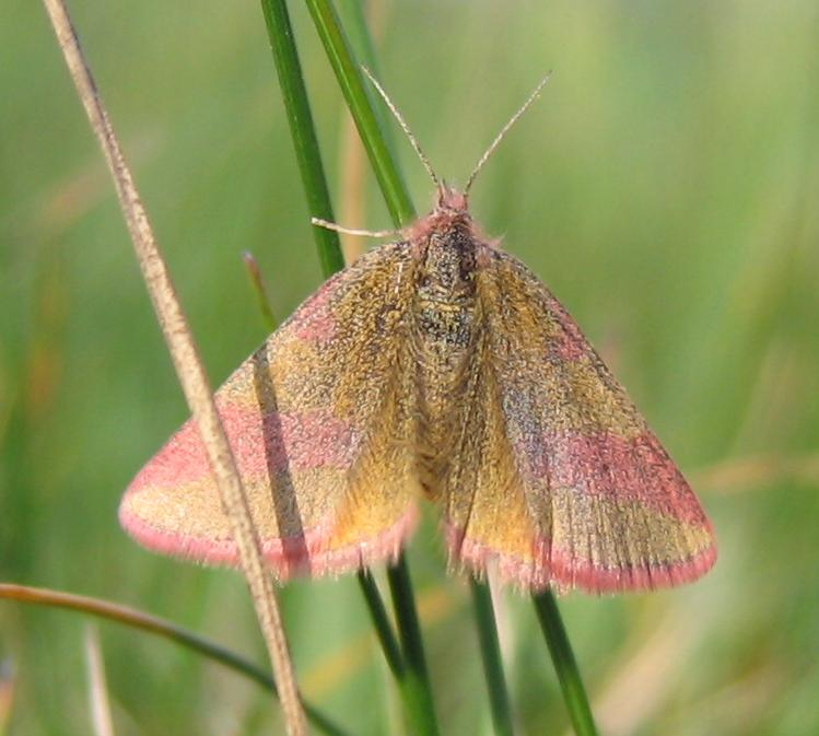 Ampfer-Purpurspanner, Groß Machnow, Brandenburg, sandige Wiese am Ortsrand